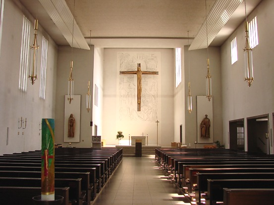 Kirche St. Augustinus, München-Trudering